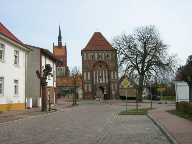 Brama wjazdowa w Usedomie